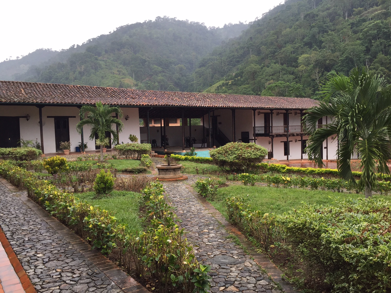 Hacienda La Victoria, sede del Museo del Café y de los inmigrantes, en el estado Mérida, Venezuela.